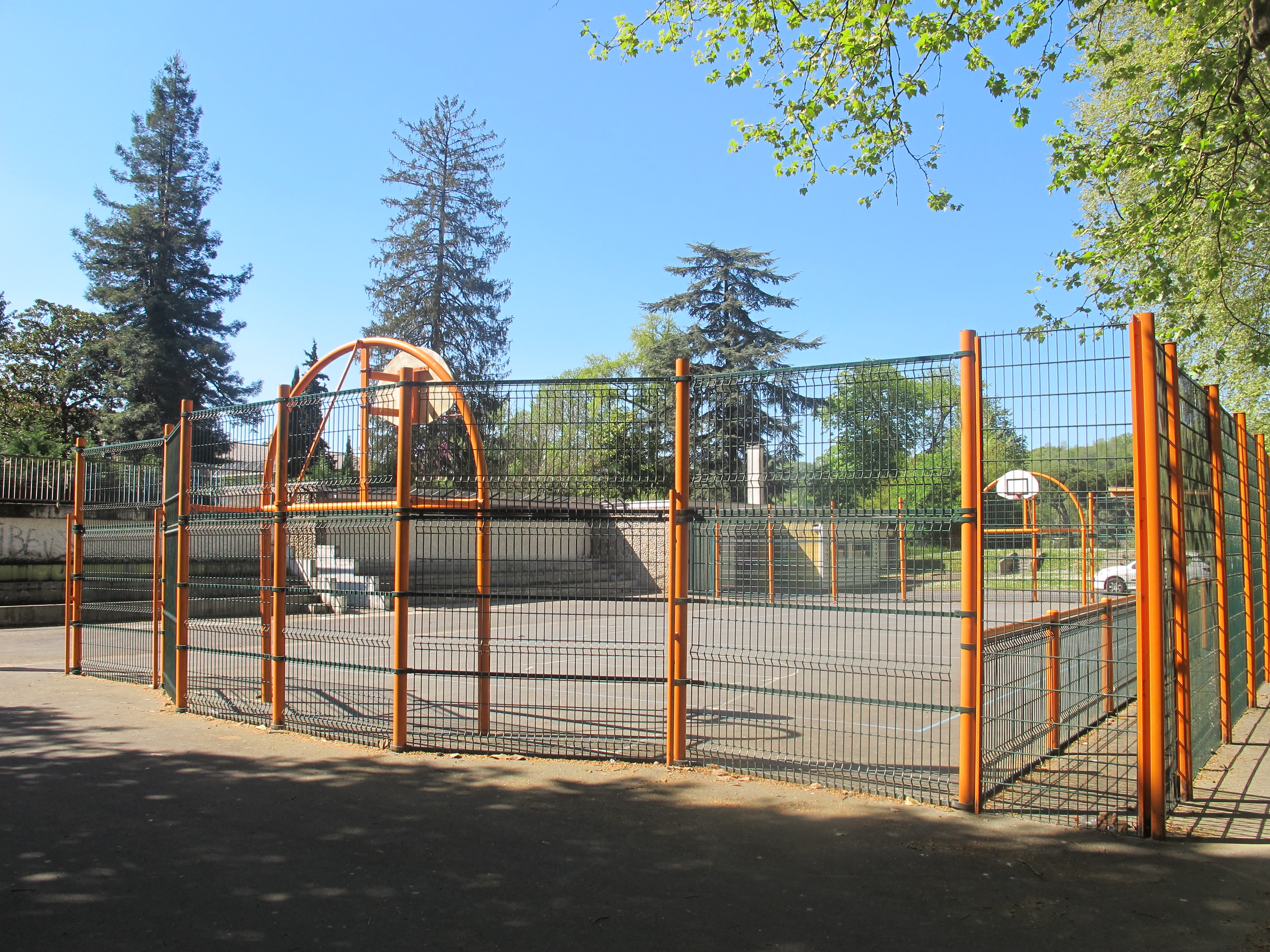 Vestiges de l'ancienne piscine de Sainte-Foy-la-Grande (Gironde), le long de l'allée Jean-Raymond-Guyon. Terrain de basket à la place du grand bassin.